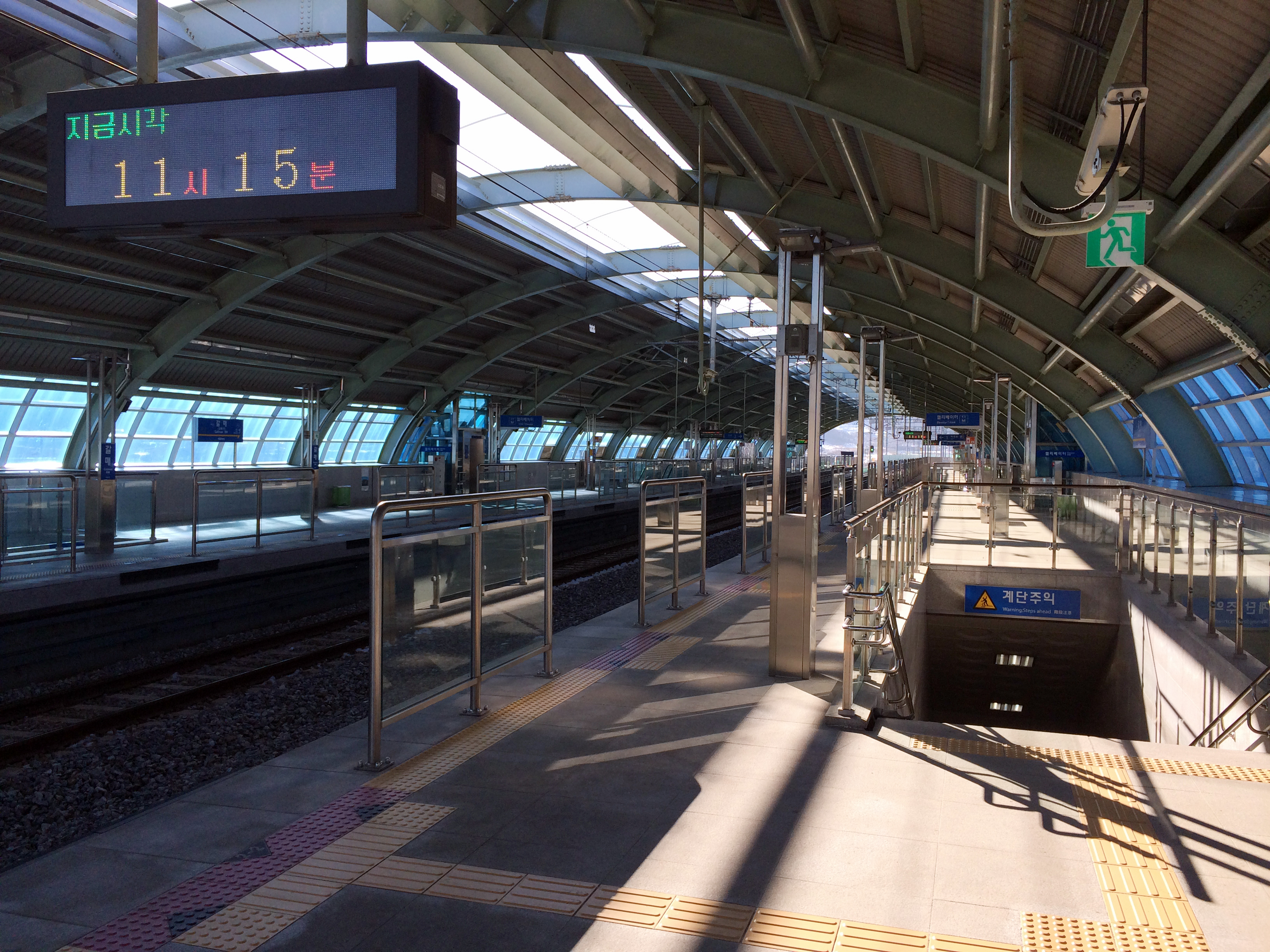 갈매역 홈